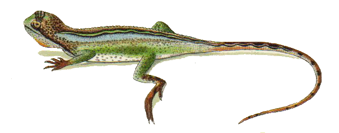 Enyalius catenatus from NIE